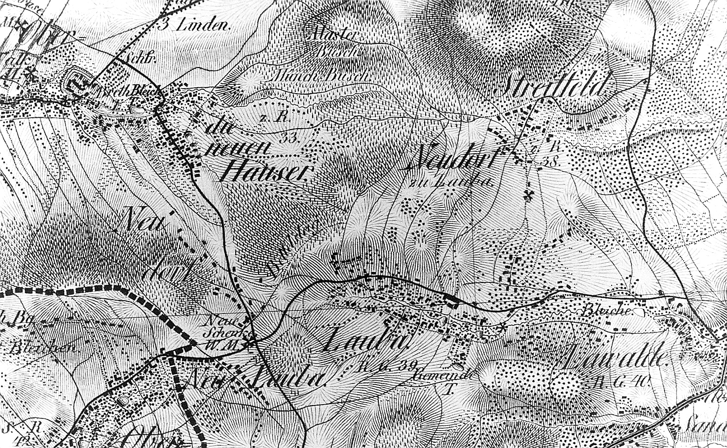 Original image description from the Deutsche Fotothek Lawalde-Lauba. Oberreit, Sect. Stolpen, 1821/22